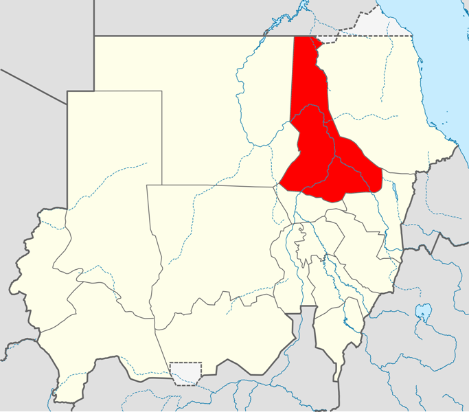 Locator map